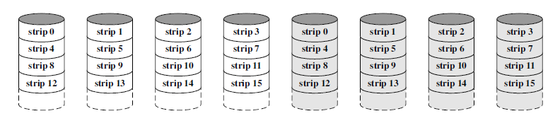 RAID 1